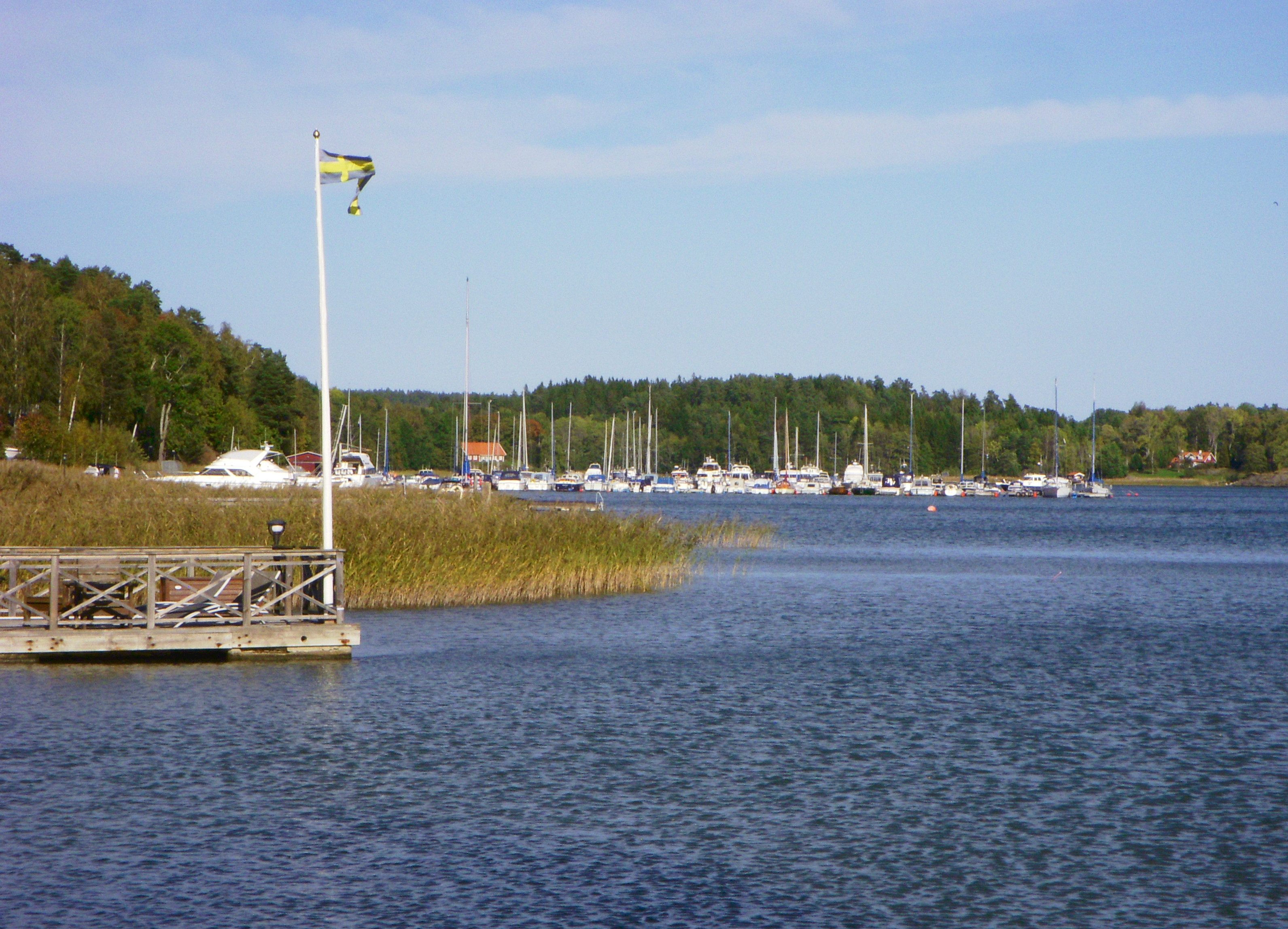 Vy över Landfjärden från Landfjärden